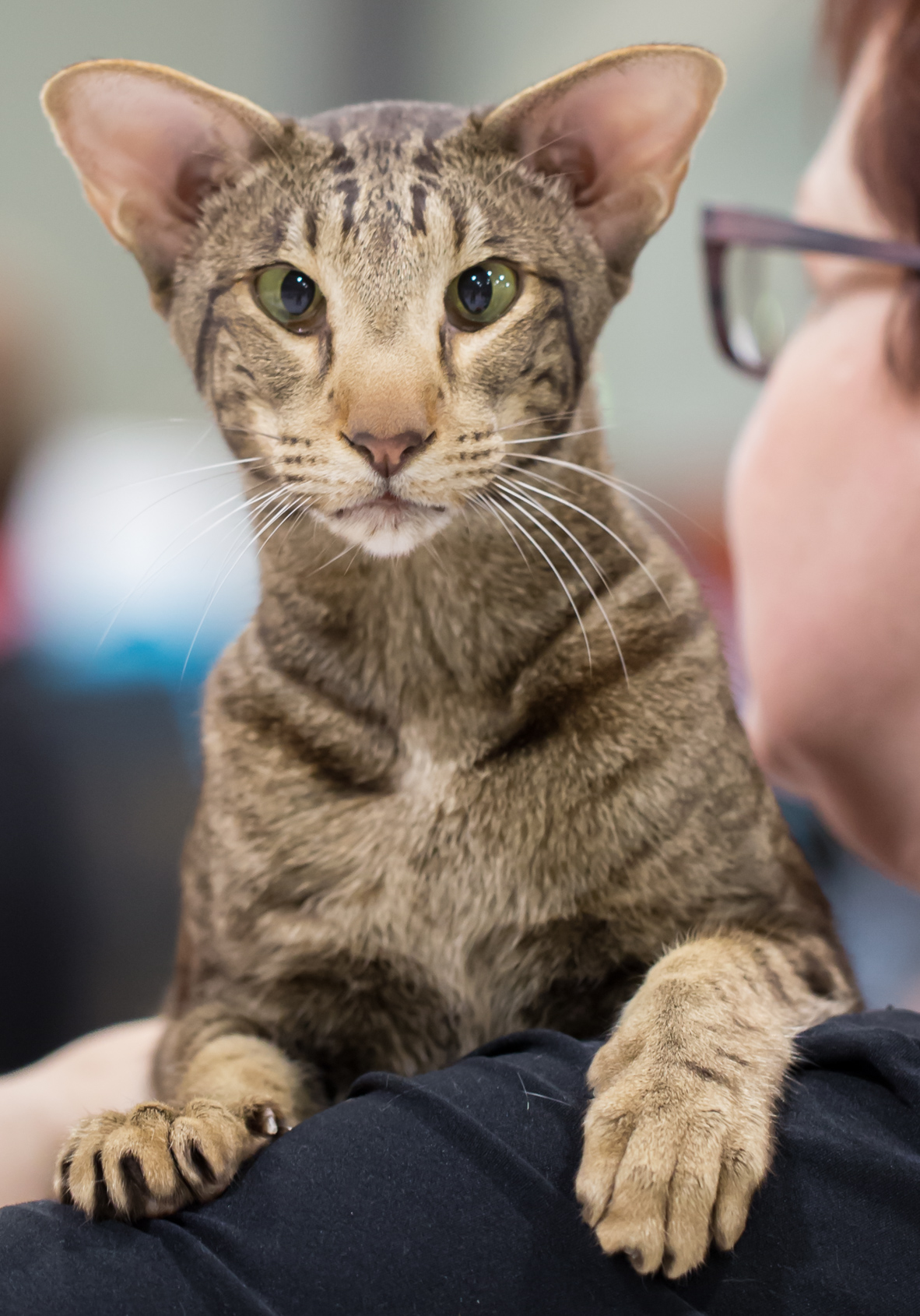 Orifame Aurinkuningas, oriental shorthair chocolate marbled tabby à l'exposition féline de Jämsä. Code FIFé (EMS) : PR,CFA PR,TICA RW,TICA SGCA Orifame Aurinkuningas (Amedei) [OSH b 22]